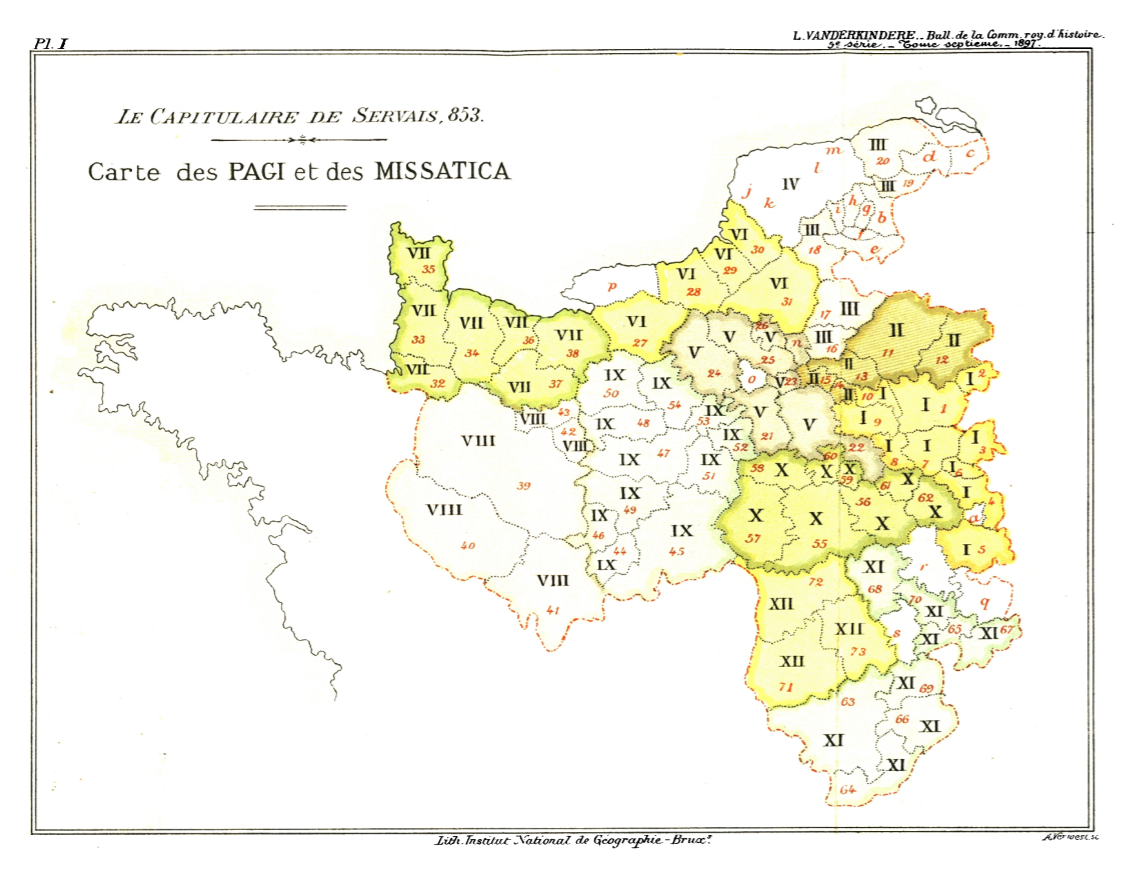 Planche I. Le Capitulaire de Servais, 853. Carte des Pagi et des Missatica - Compte-rendu des séances de la commission royale d'histoire. Cinquième Série, Tome 7, 1897.